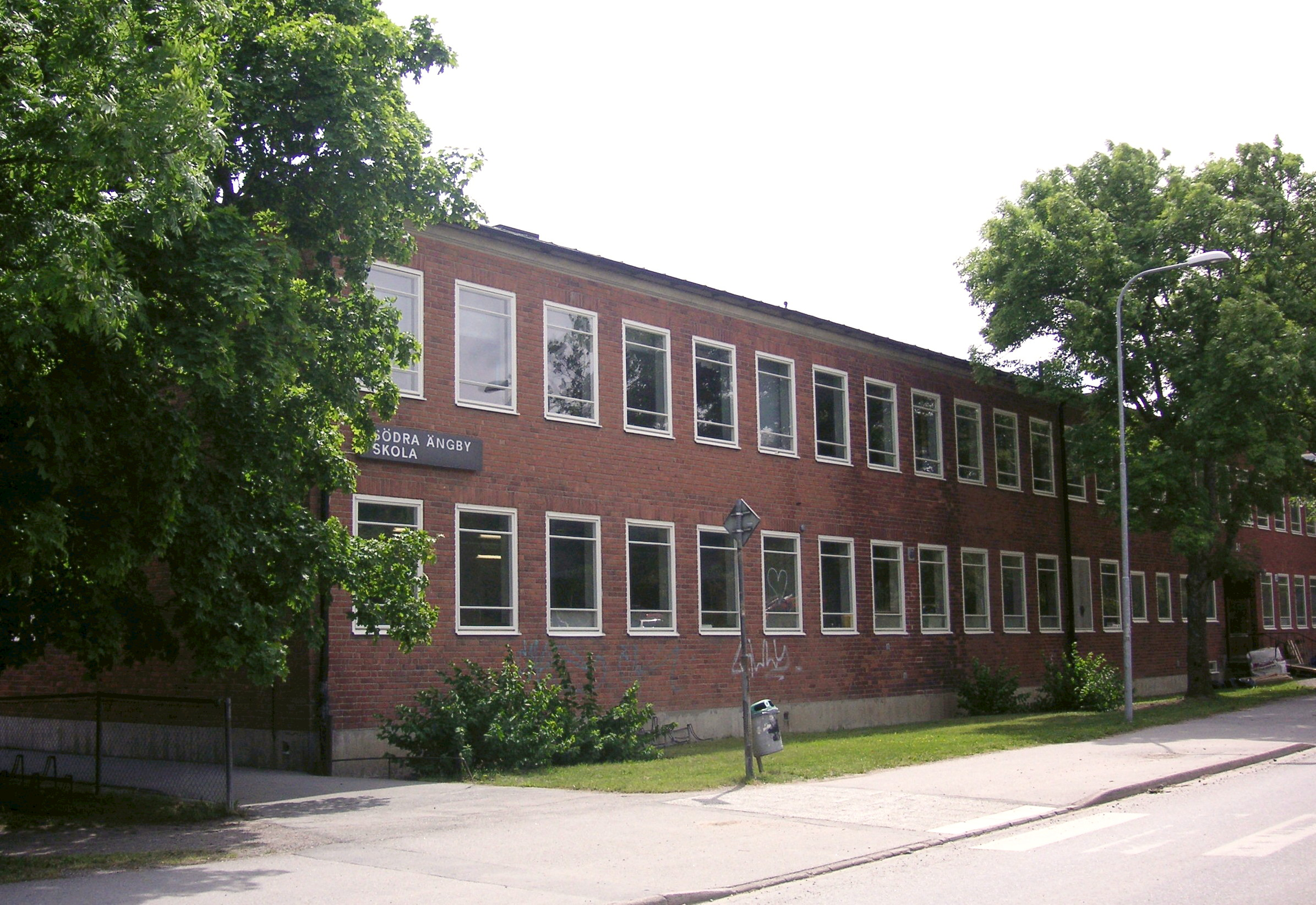 Södra Ängby skola, Bromma stadsdelsområde, Sverige